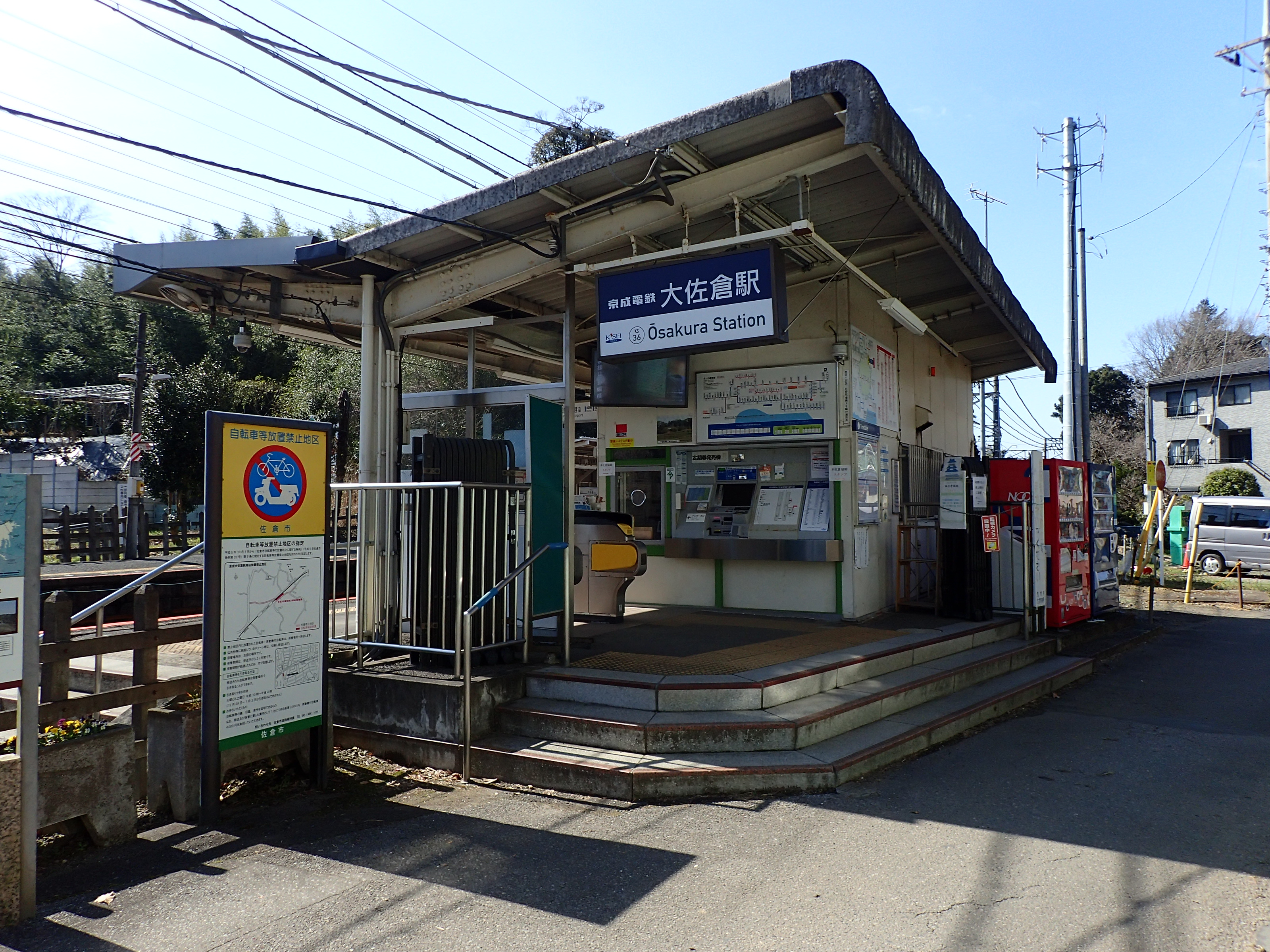 大佐倉駅（2020年2月）